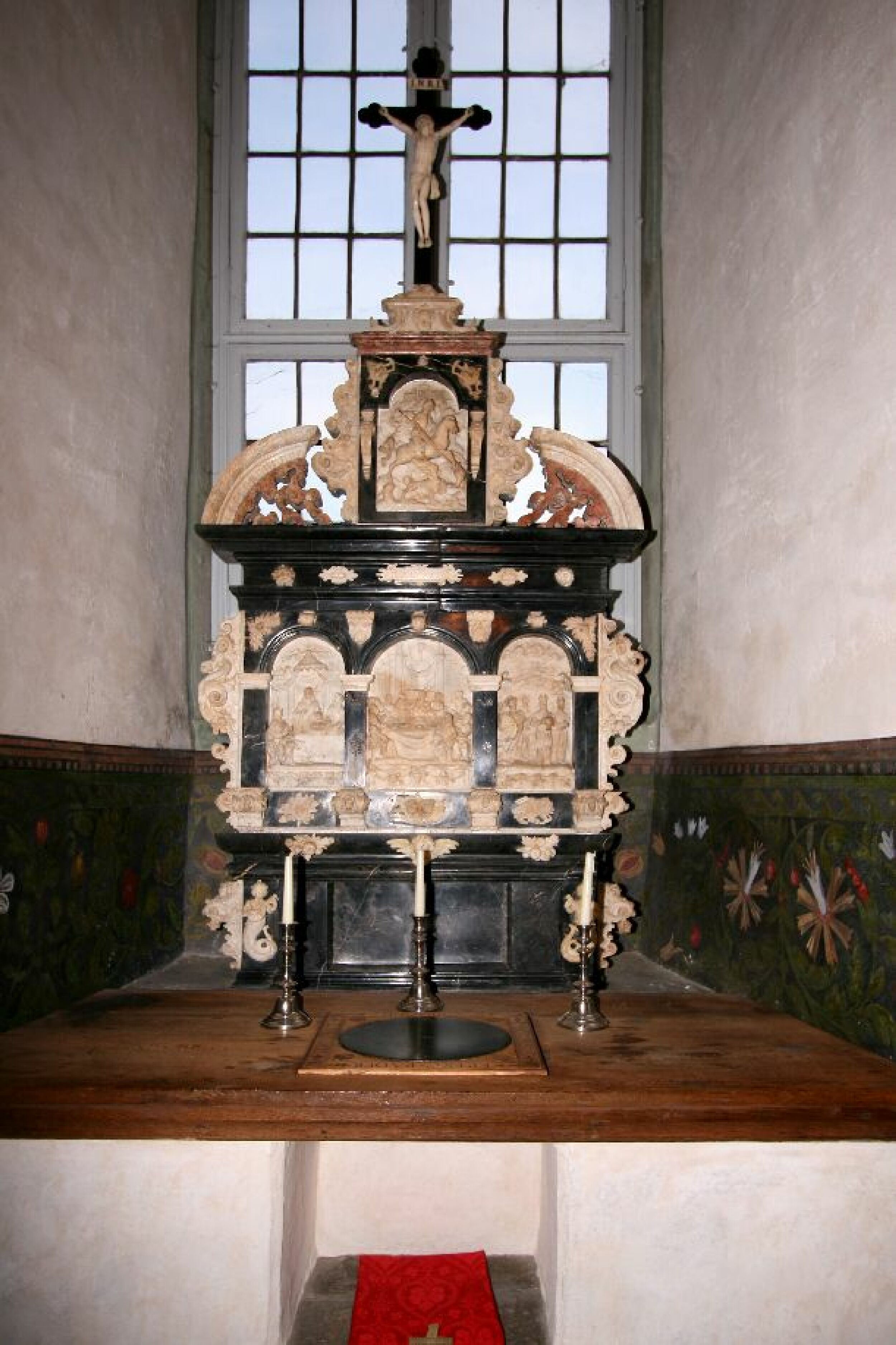 Burg Schnellenberg, Kapelle, Altar Gesamtansicht